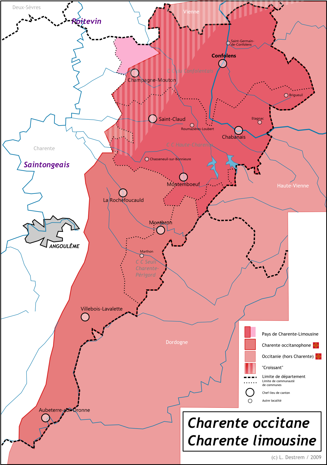 Carte linguistique de la Charente occitane + délimitation de la Charente limousine